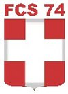 Badge of Croix de Savoie Gaillard.